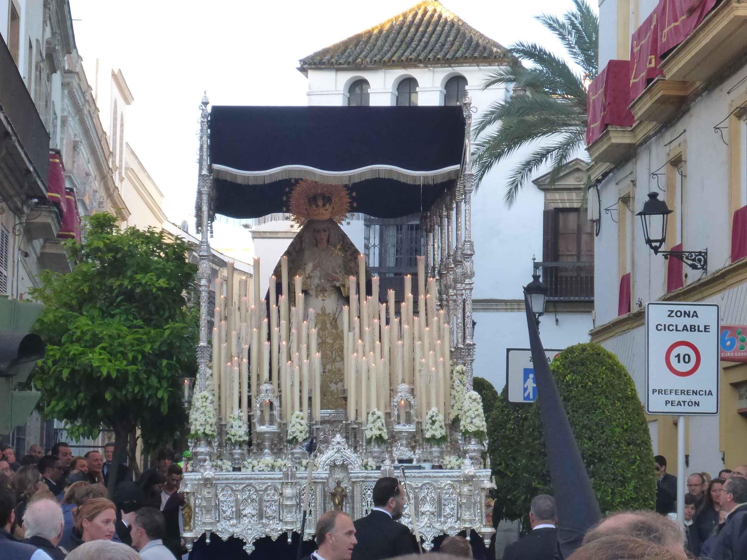 Hermandad de la Buena Muerte (Jerez)